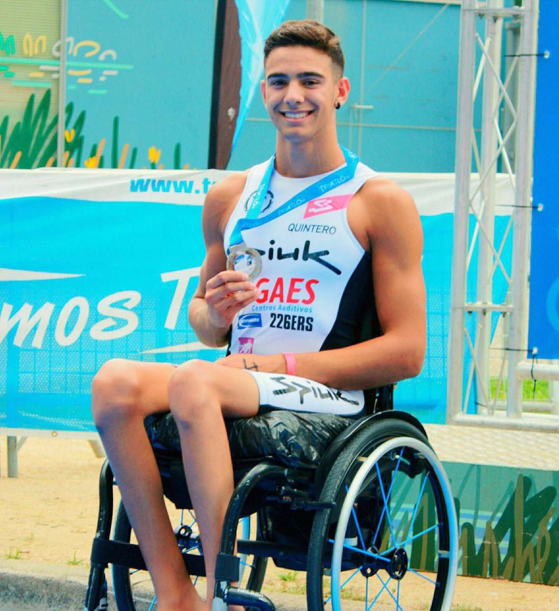 Jose Manuel Quintero Paratriatleta Español Conferenciante